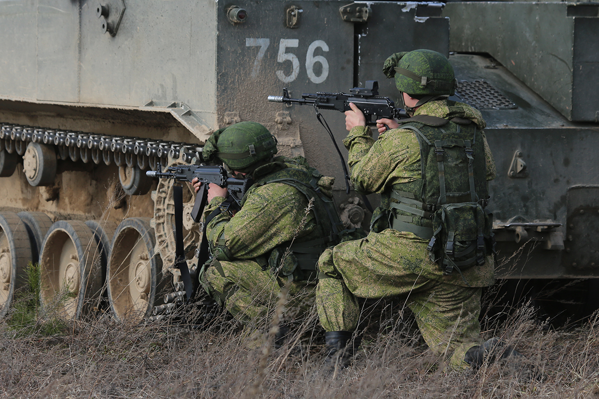 АК74М